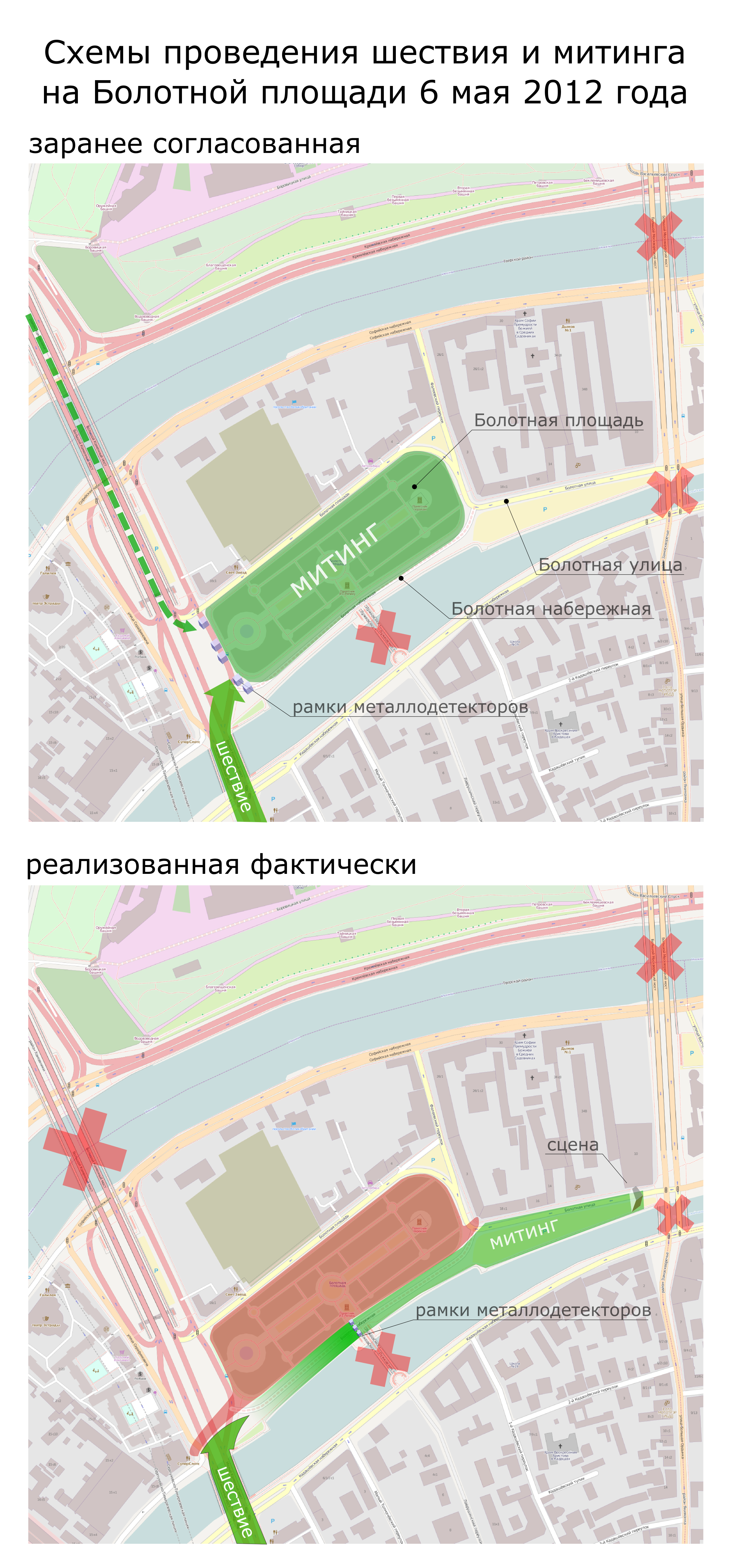 Согласованная заранее и реализованная фактически схемы проведения шествия и митинга на Болотной площади 6 мая 2012 года.